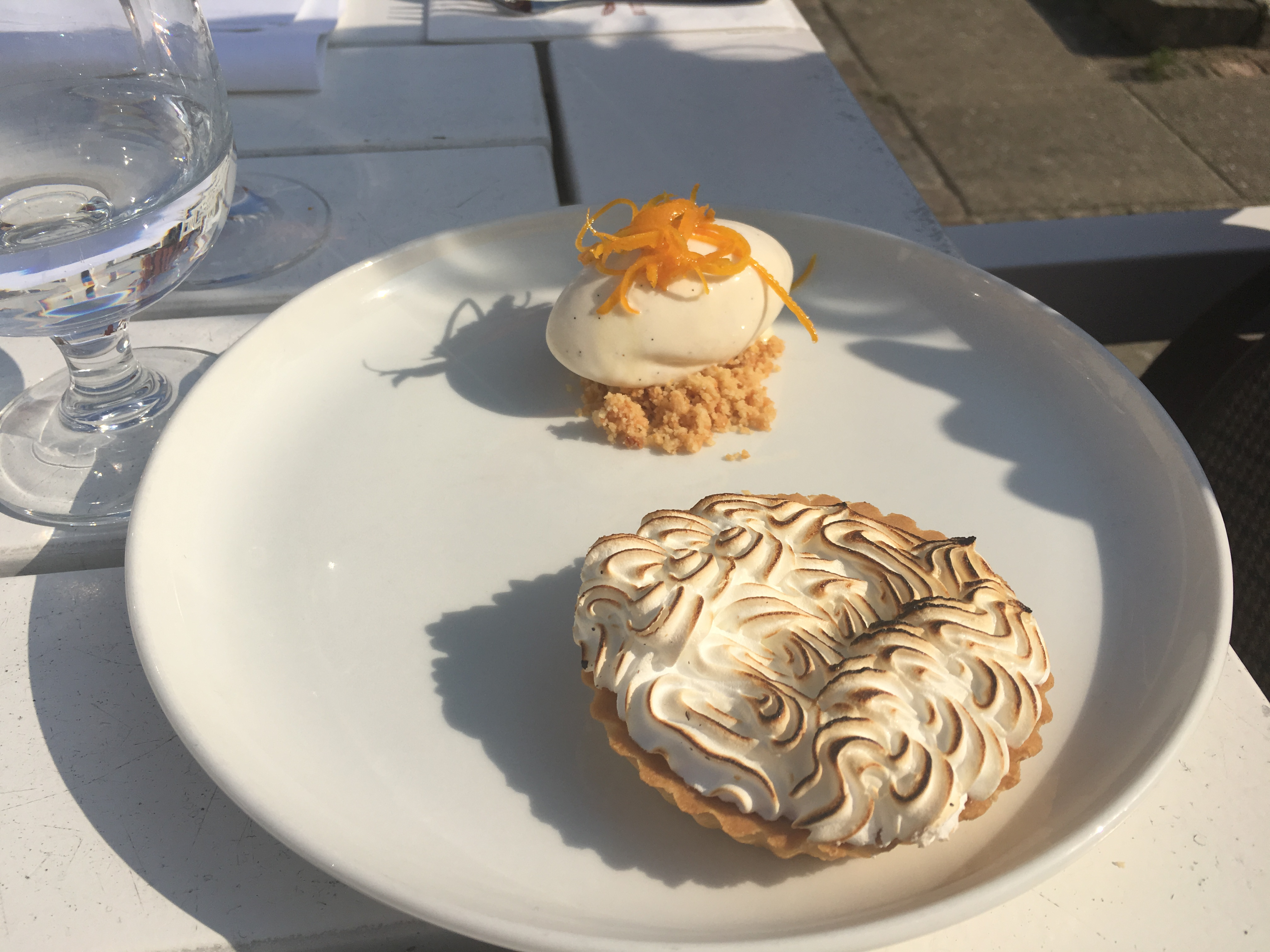 Klassisk fransk dessert; citrontærte med marengs